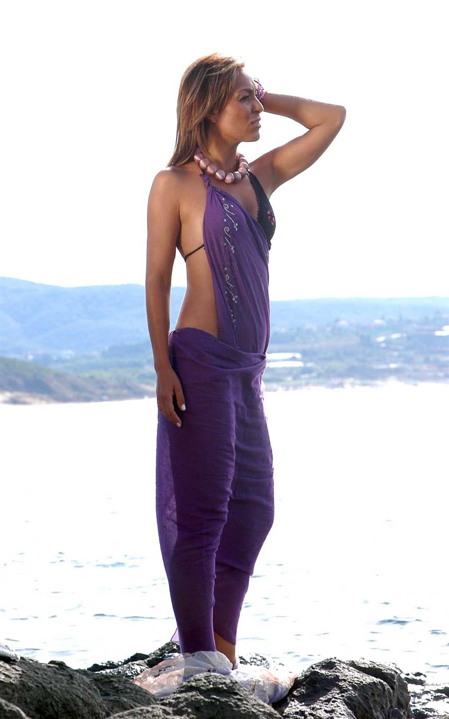 Ziynet Sali, singer